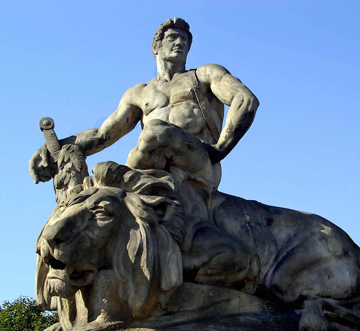 Wrocław, fontanna z alegoriami Walki i Zwycięstwa (dec. studnia Walki i Zwycięstwa), 1905